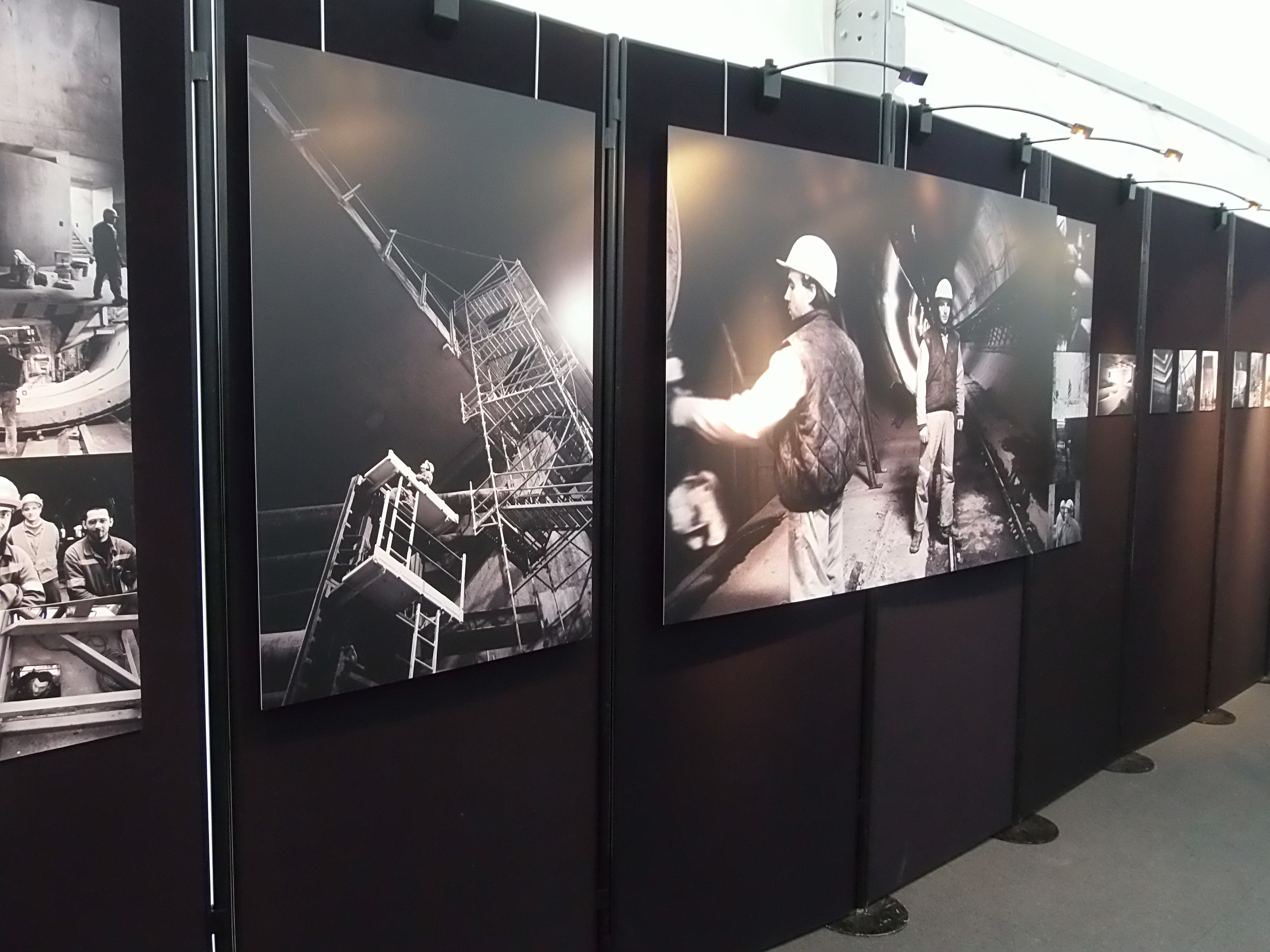 Visite du chantier du tunnelier de la ligne B du métro de Rennes le 22 décembre 2014. Photos du chantier de la ligne A.